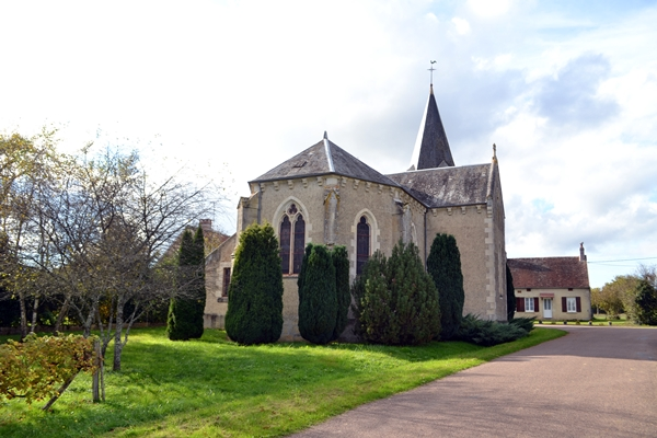 Eglise de Saint-Malo-en-Donziois, Nièvre (58).